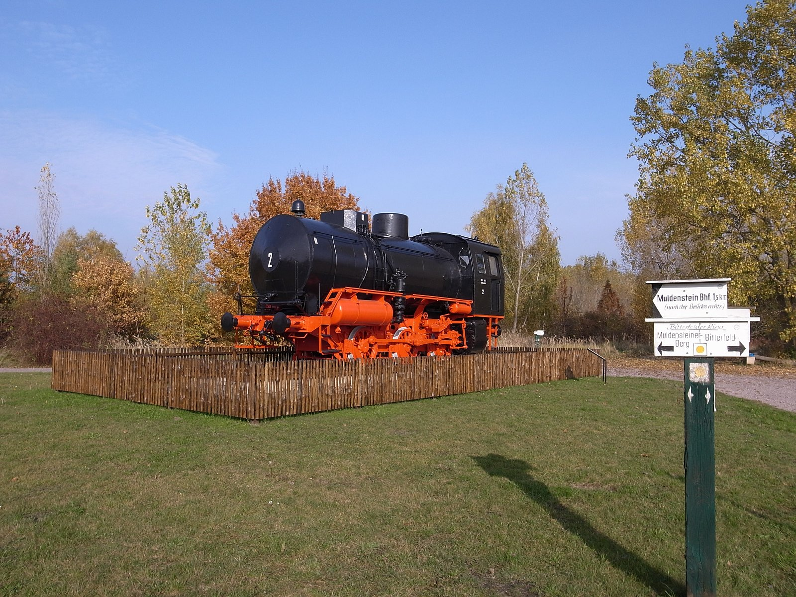 Friedersdorf (Mulde), Technisches Denkmal Dampfspeicherlokomotive